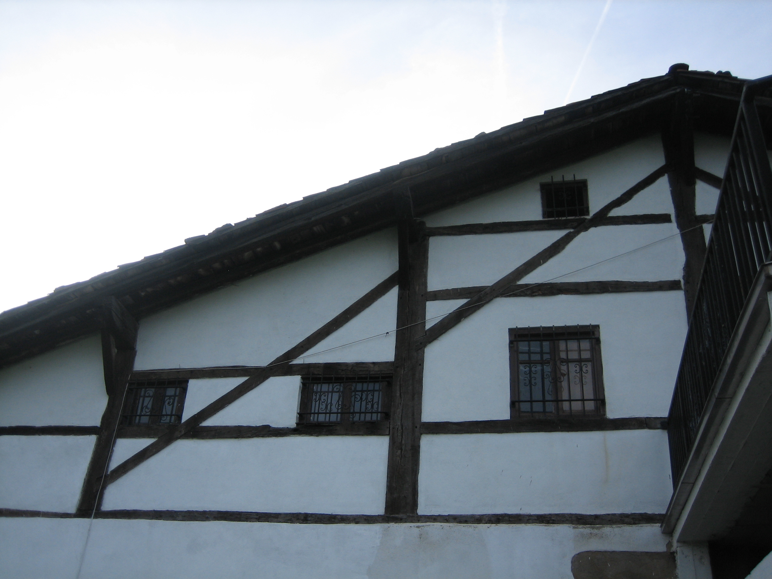 Letamendi baserriaren egurraren egitura.